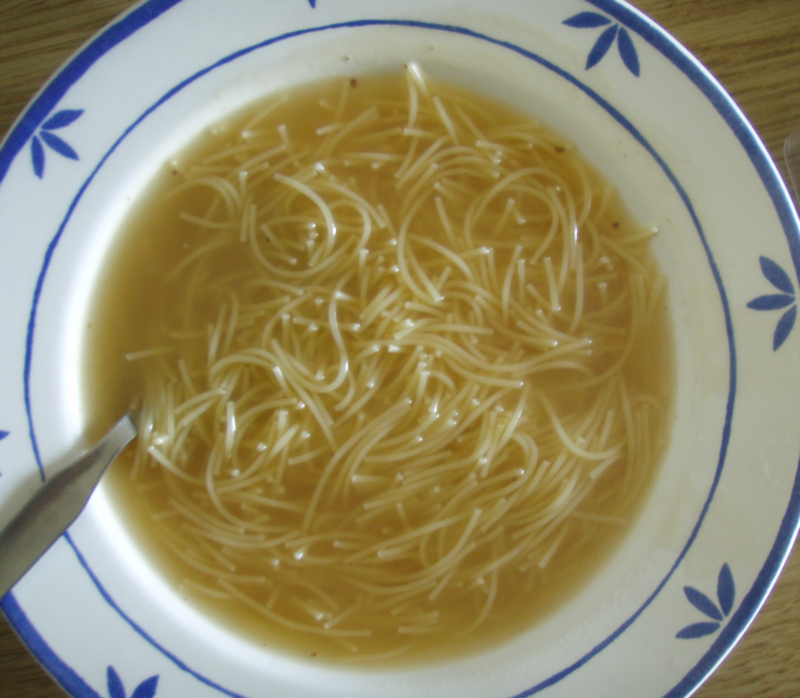 Sopa